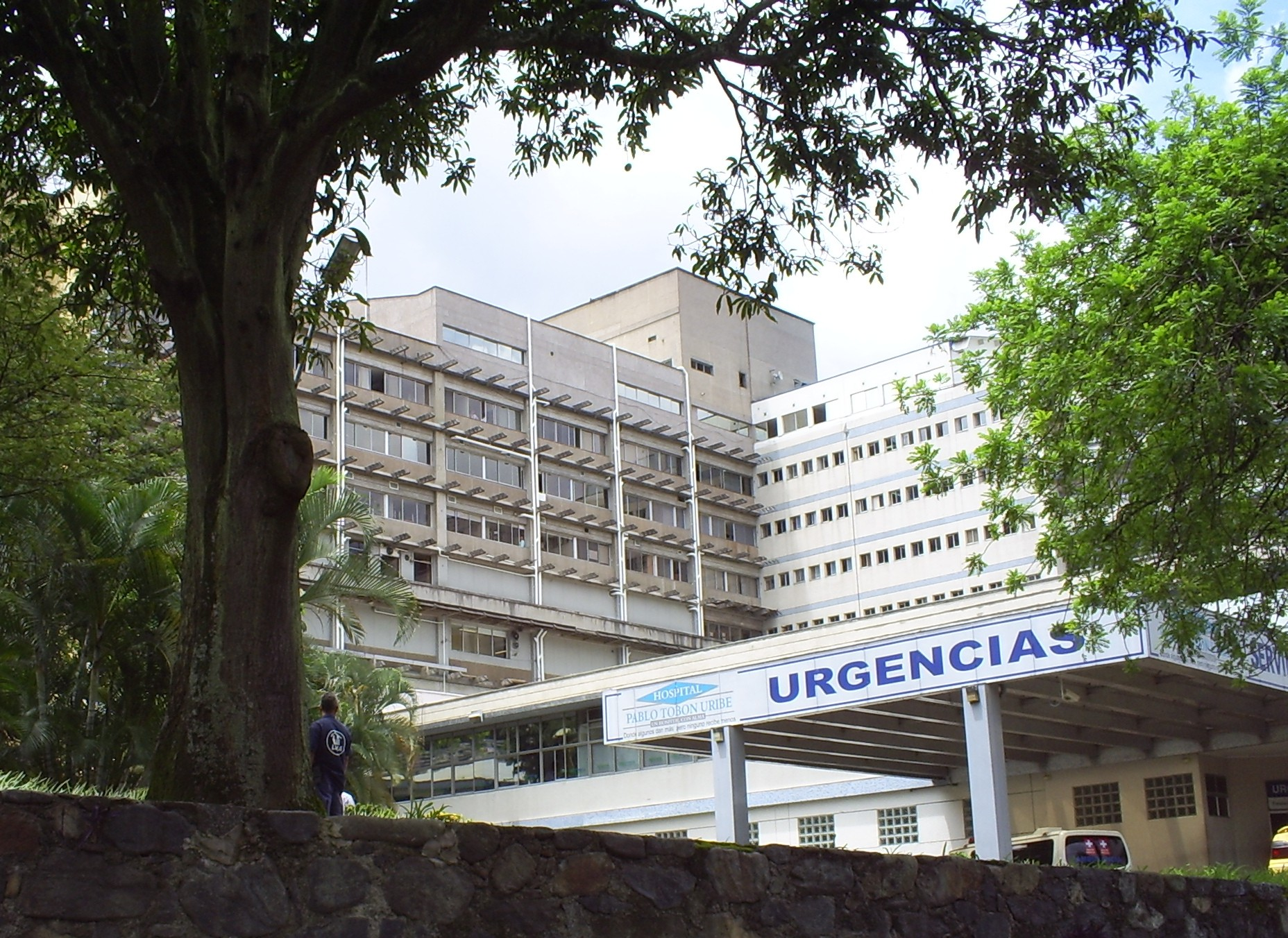 Hospital Pablo Tobón Uribe, Medellín, Colombia